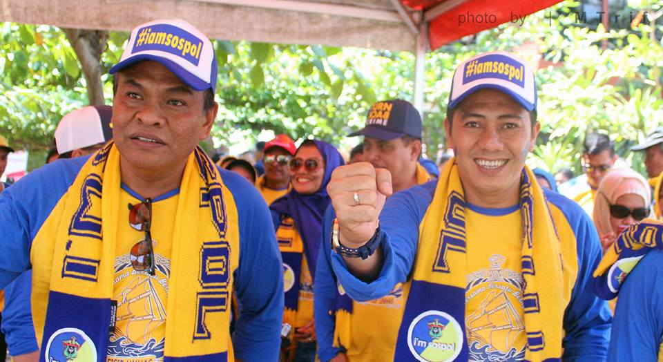 dalam Temu alumni unhas 2016